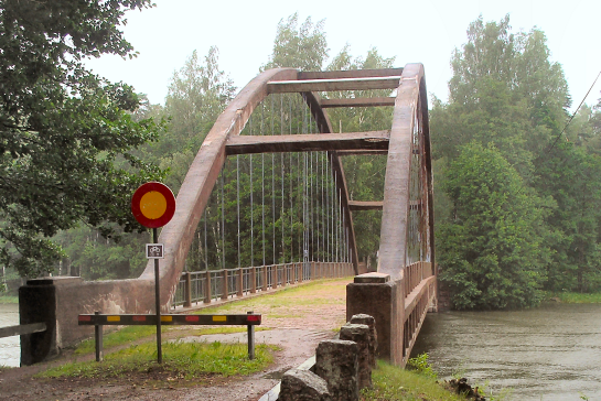 Pyttis, Abborrfors, Bron över Rökhusforsen